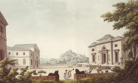 cour du château de Bagatelle à Paris